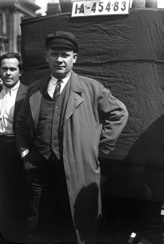 Der Kandidat für die kommende Reichspräsidentenwahl der kommunistischen Partei Deutschlands ! Der Führer der deutschen kommunistischen Arbeiterpartei Thälmann, welcher als Kandidat für die Reichspräsidentenwahl aufgestellt wird.